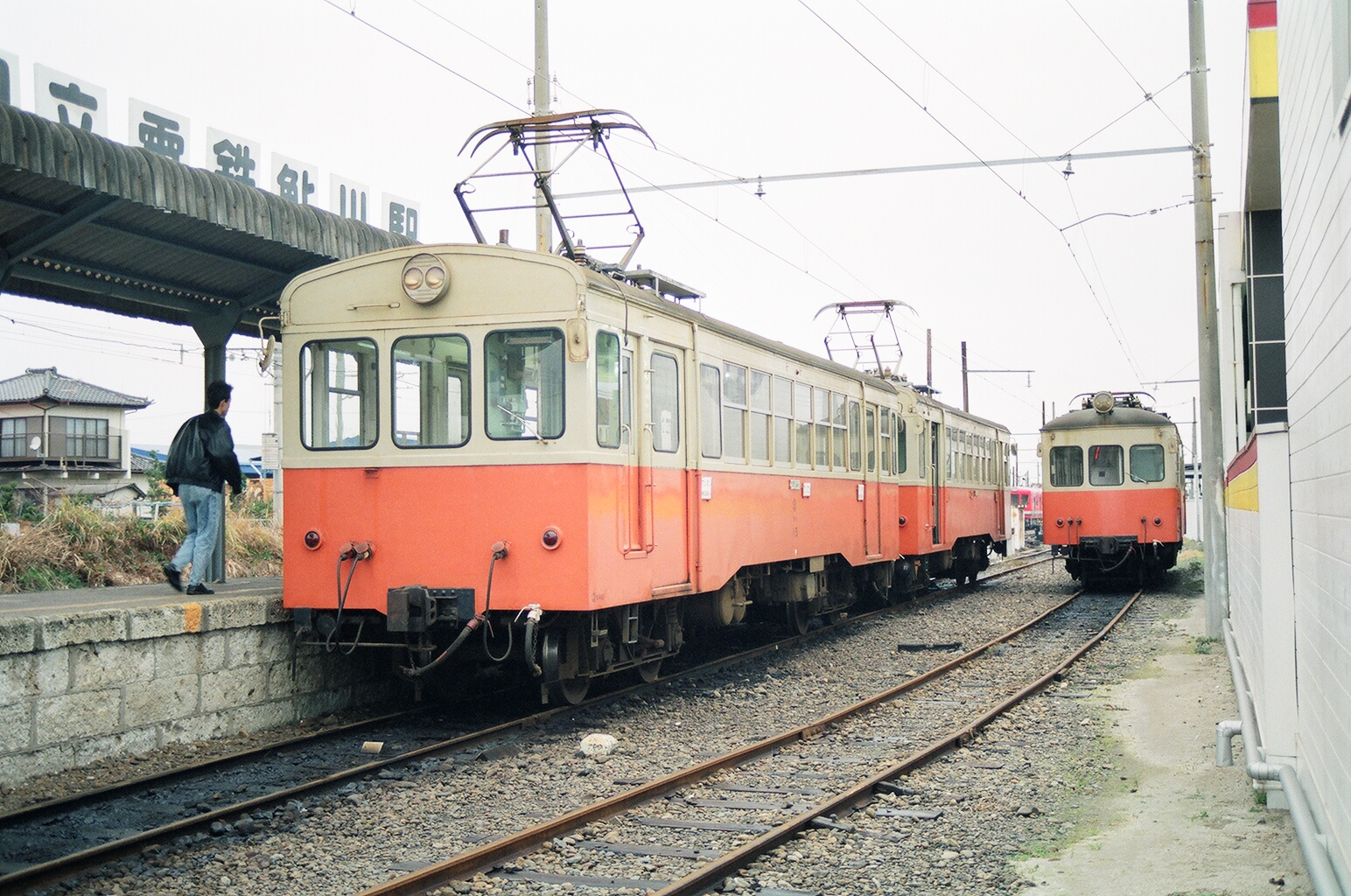 日立電鉄の車両、左:モハ15+モハ16、右:モハ9、鮎川駅にて撮影（1991年）